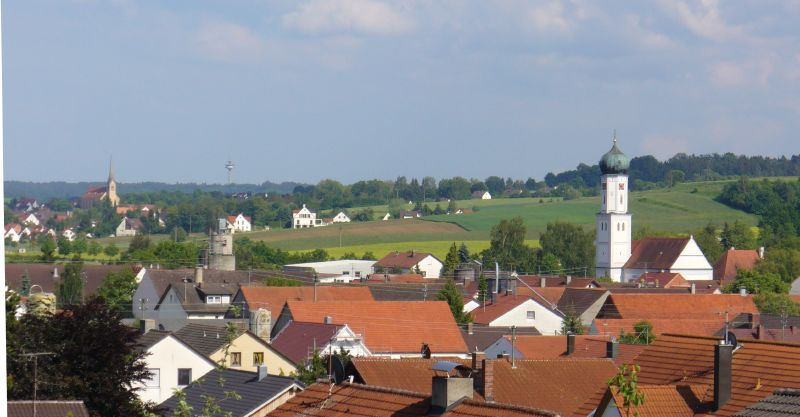 Todtenweis (vorne, mit Pfarrkirche St. Ulrich und Afra) und Aindling (Hintergrund links)